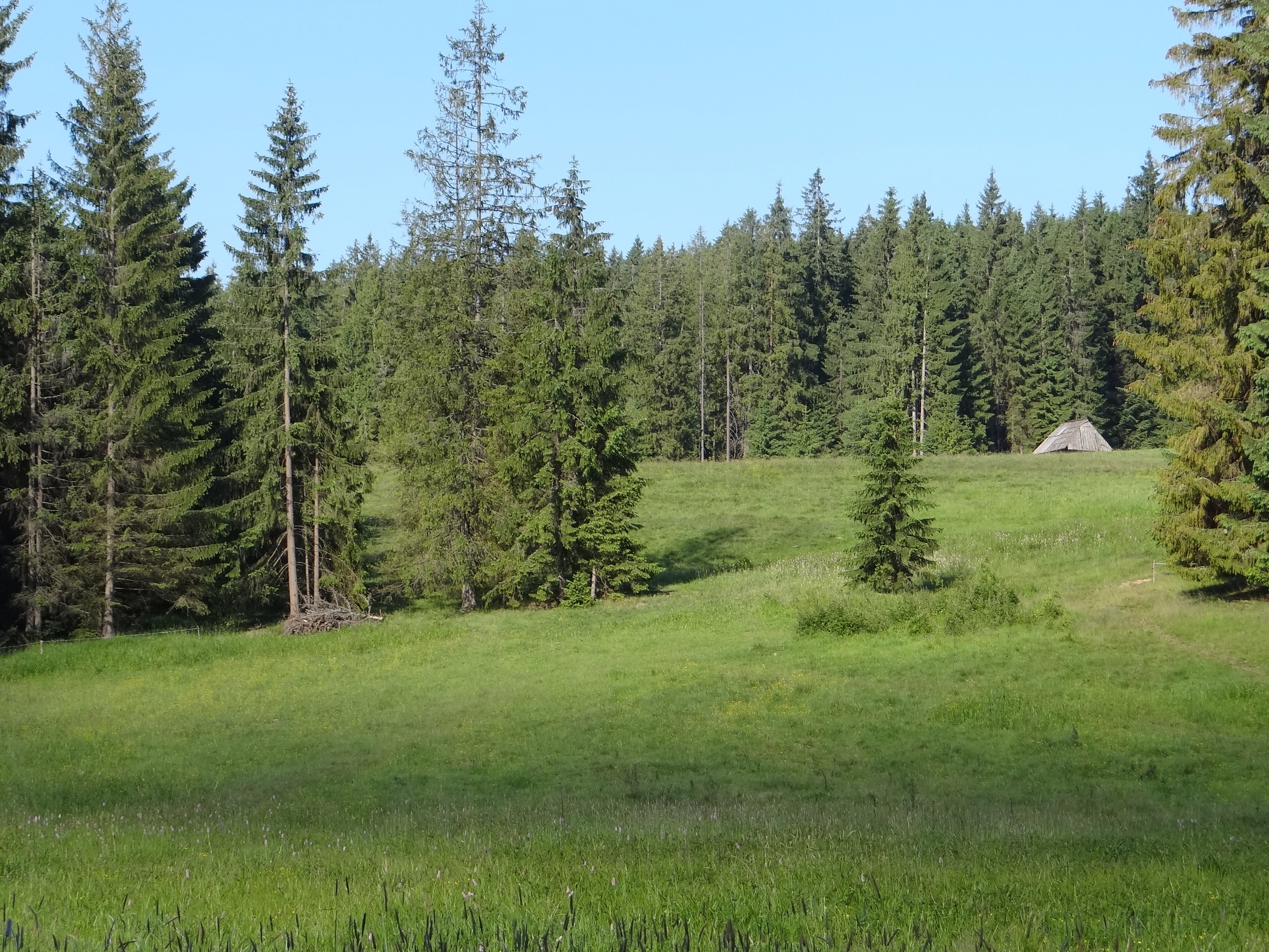 Polana Szczurków ka Witowie